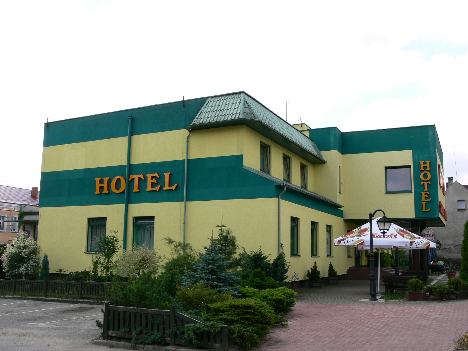 Kalisz Pomorski - Motel Solaris znajdujący sie w centrum miasta